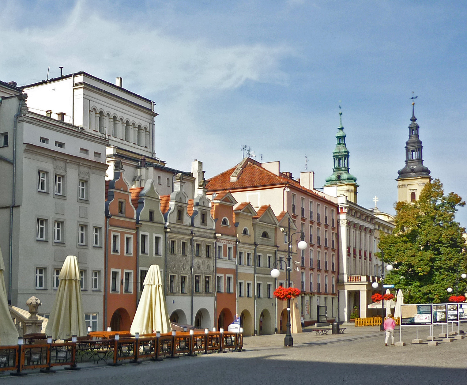 Häuser am Ring (Heringsbuden) in Liegnitz/Legnica